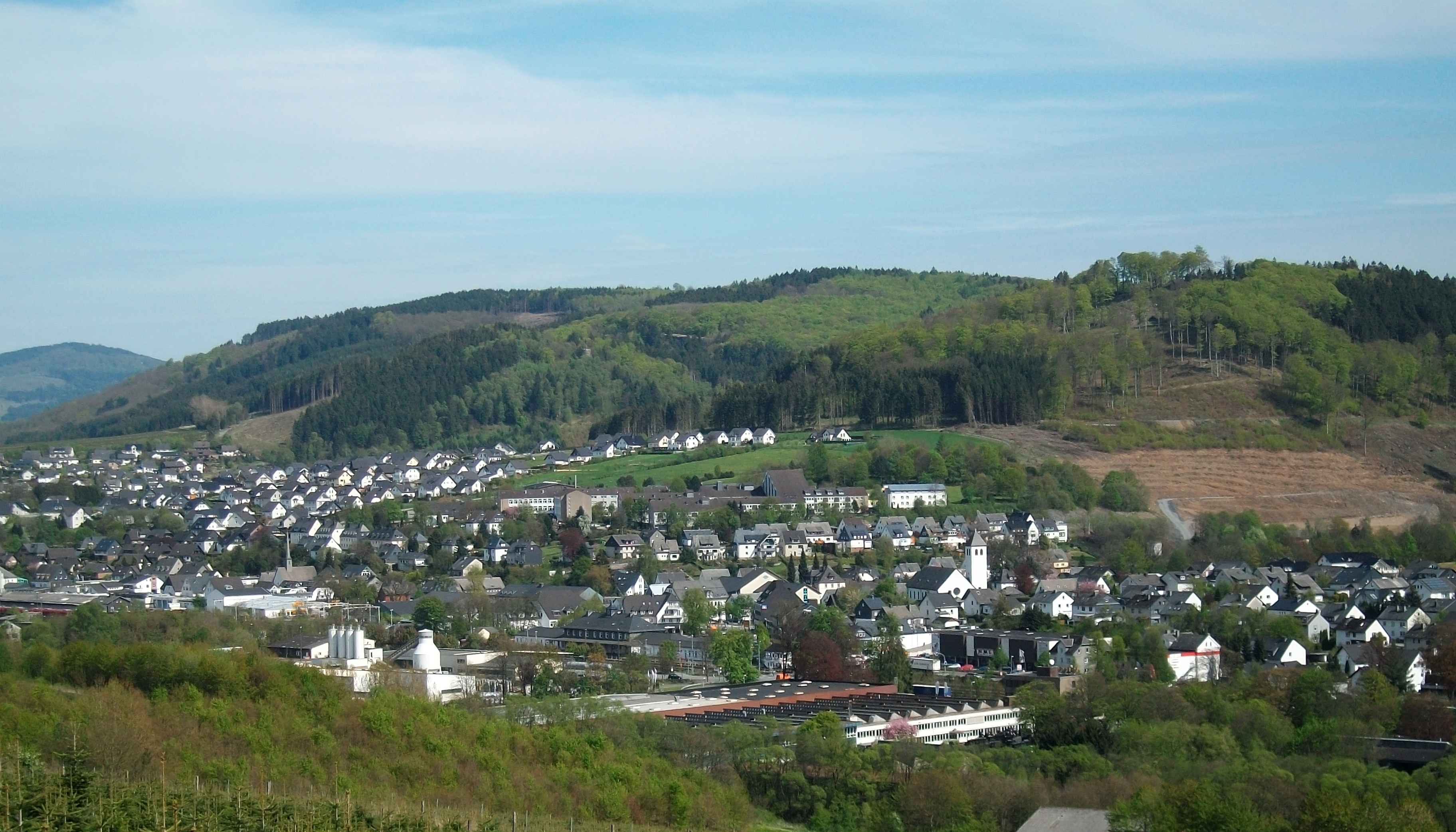 Bestwig (Germany)